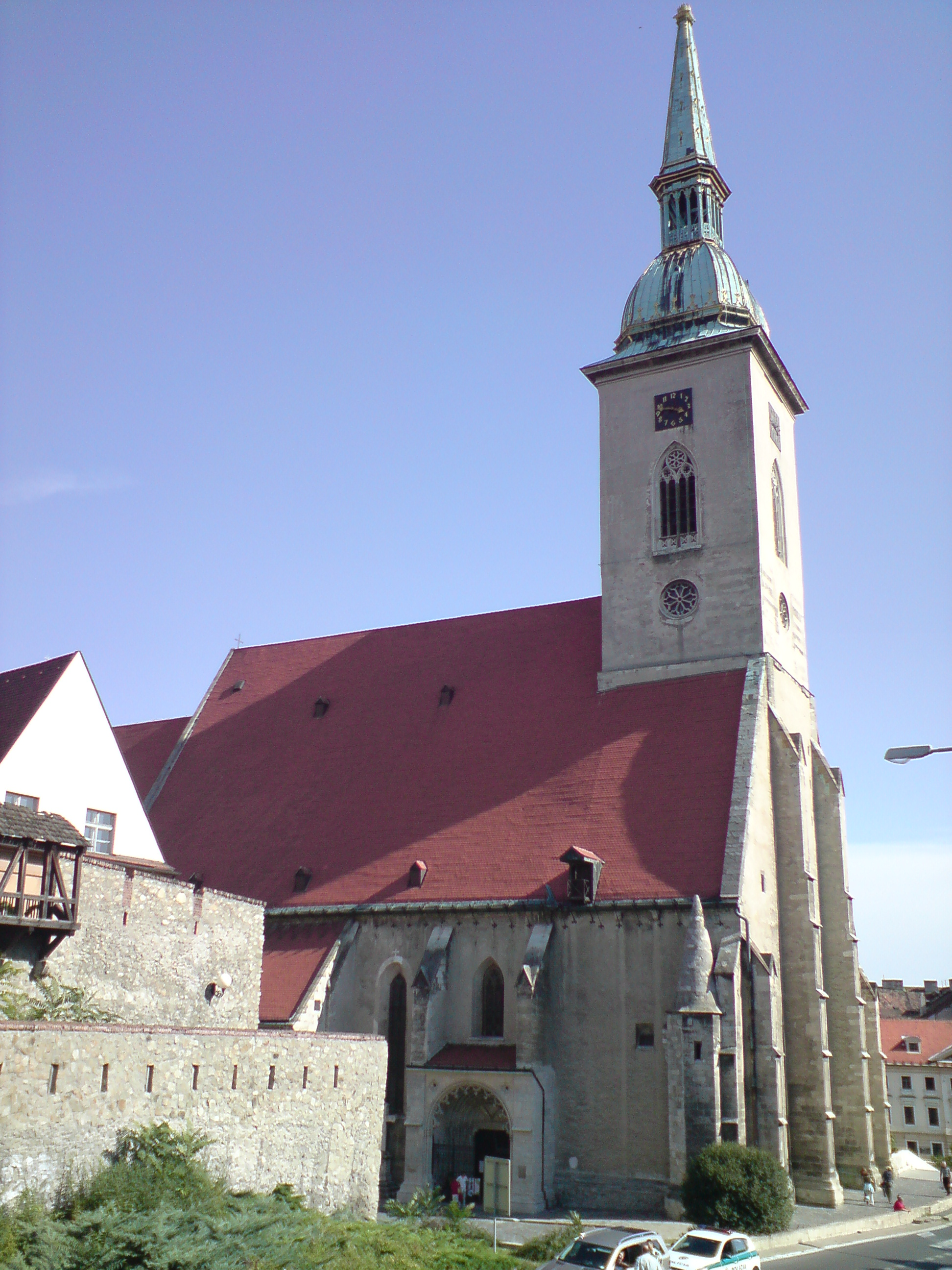 Katedrála sv. Martina, Bratislava